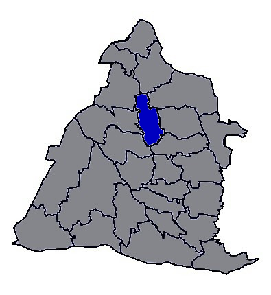 臺灣省彰化縣秀水鄉。